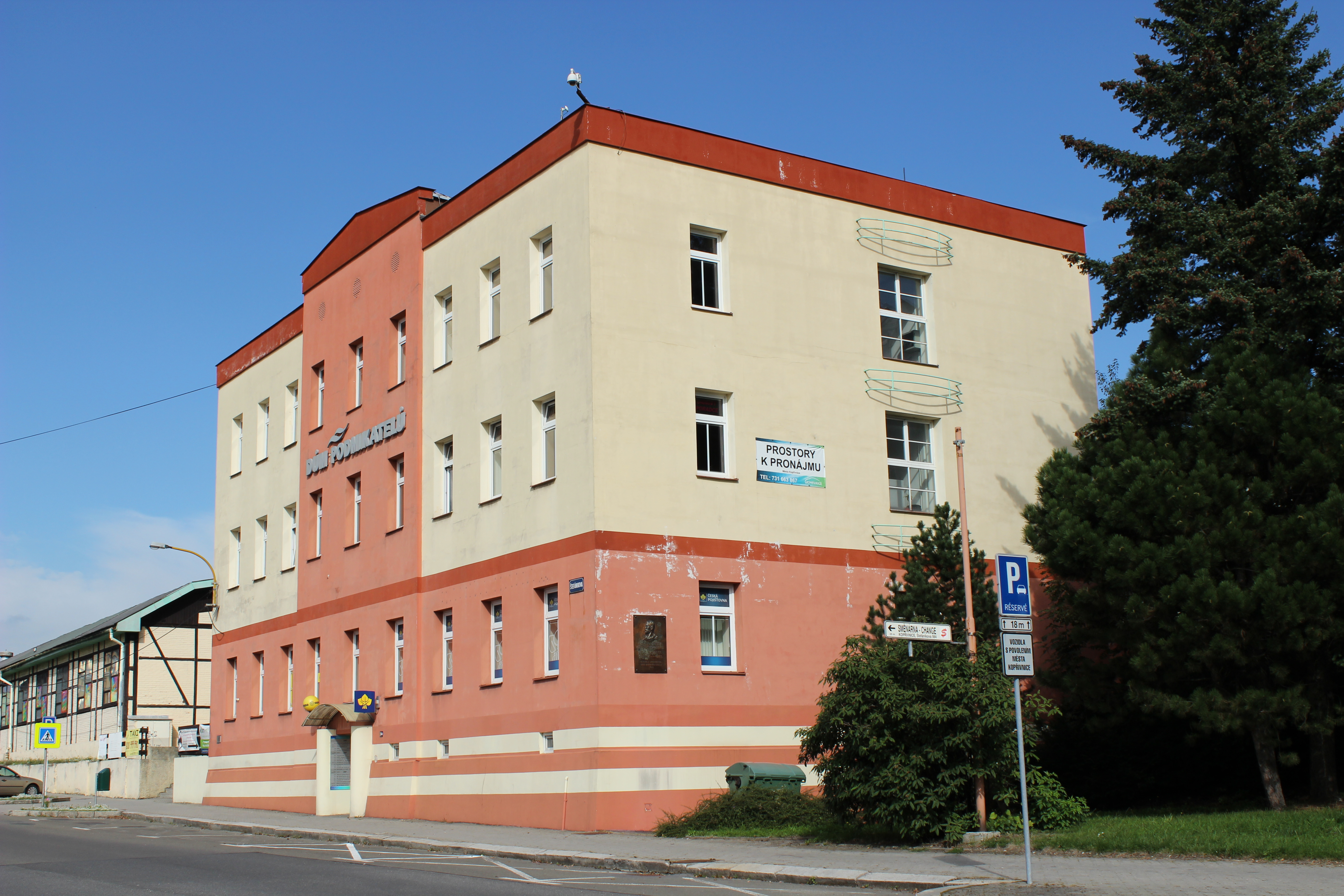 Dům podnikatelů v kopřivnické Štefánikově ulici. This image was acquired during the event Wikiměsto Kopřivnice.